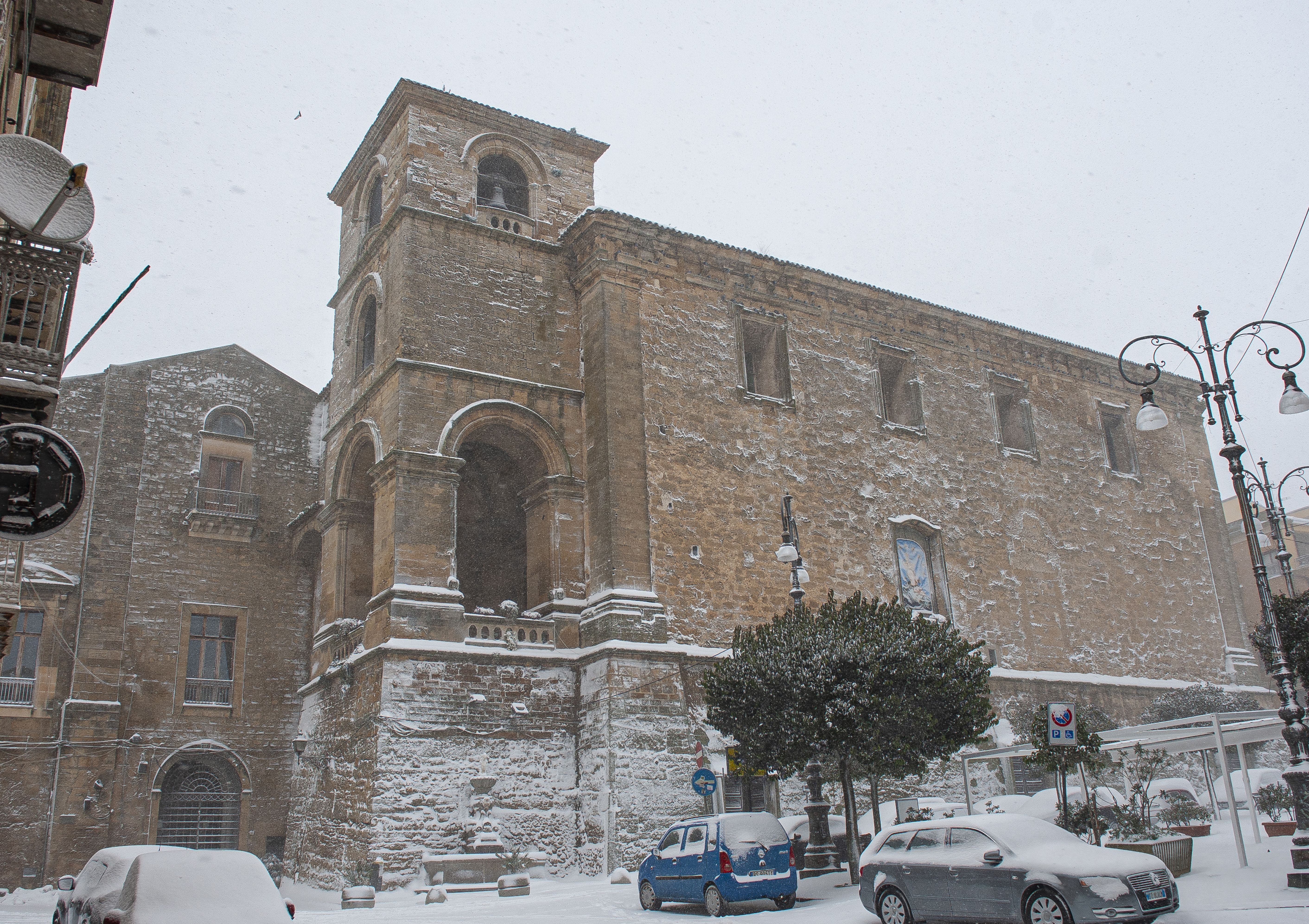 Scorcio di Piazza Vittorio Emanuele avvolta dalla neve